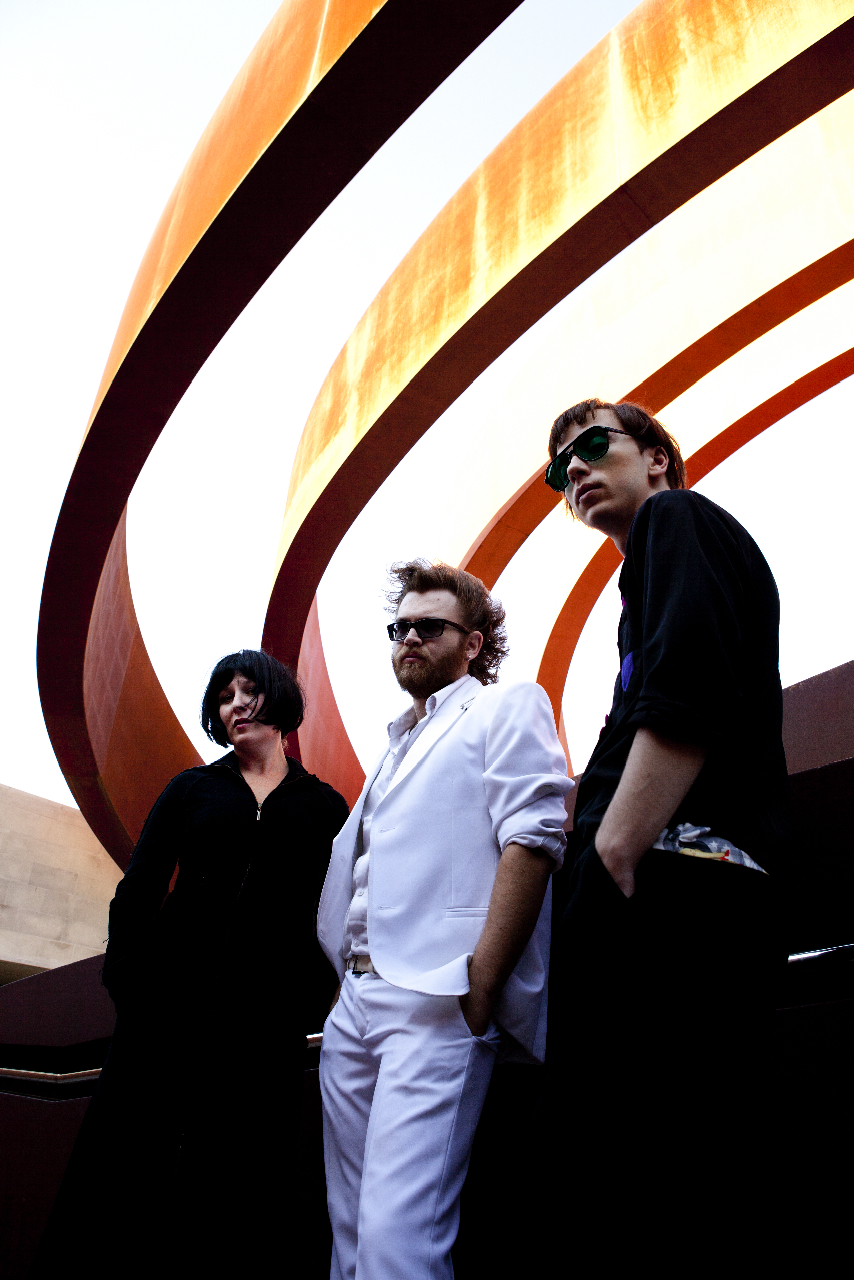 להקת ג'וריתמיקס